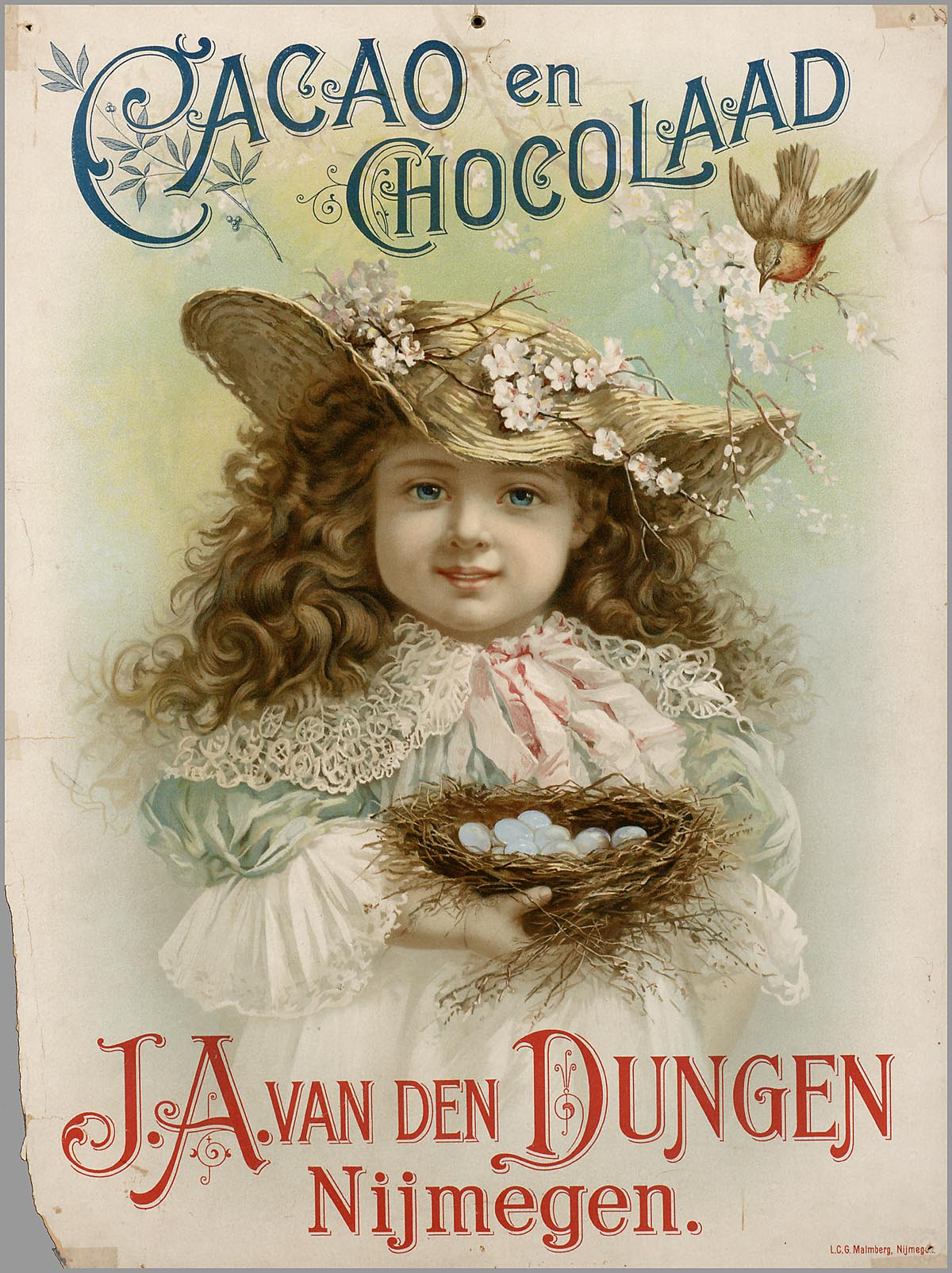 Affiche: Cacao en Chocolaad. J.A. van den Dungen Nijmegen.